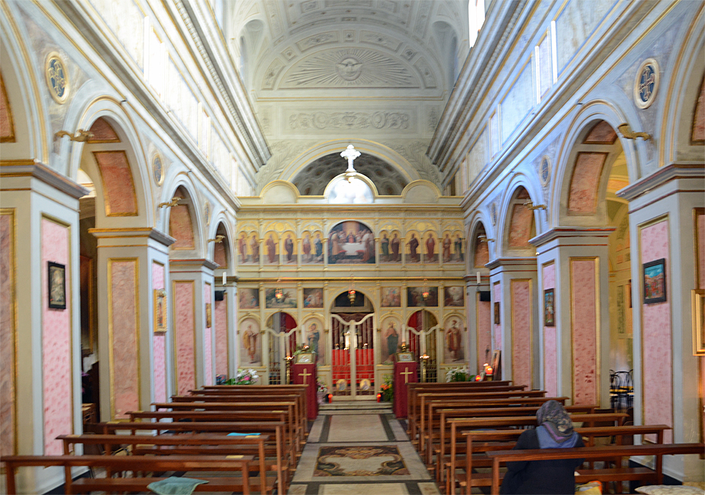 Kirche San Salvatore delle Coppelle, Rom